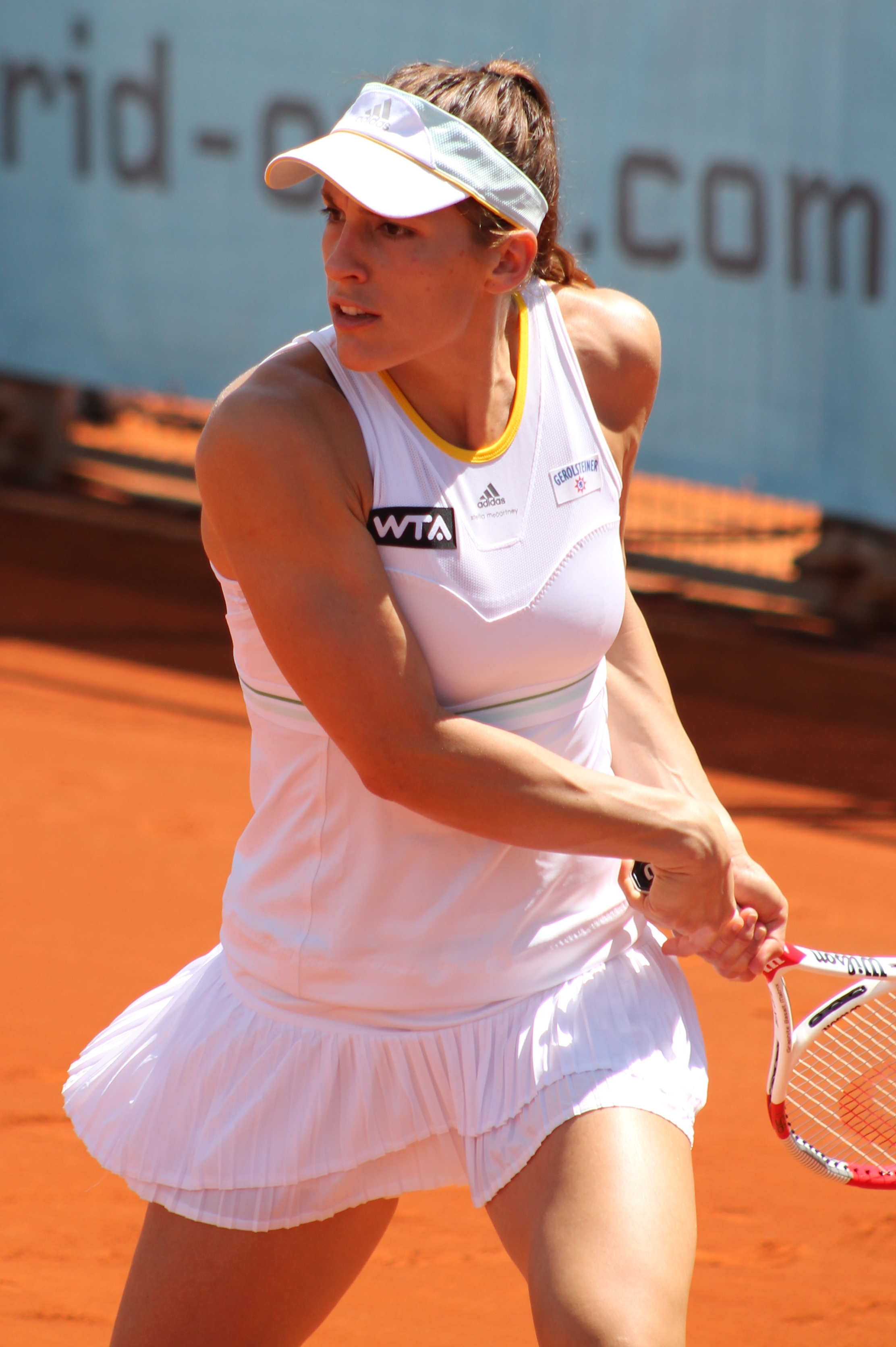 Petkovic MA14 (6)